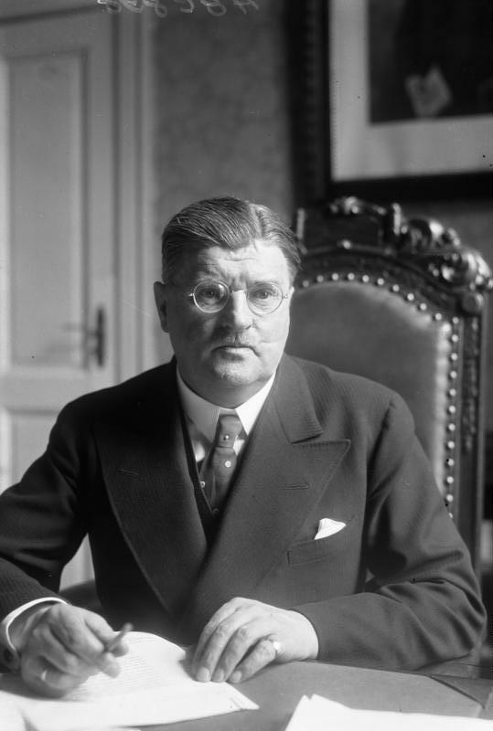 Staatssekretär Meißner